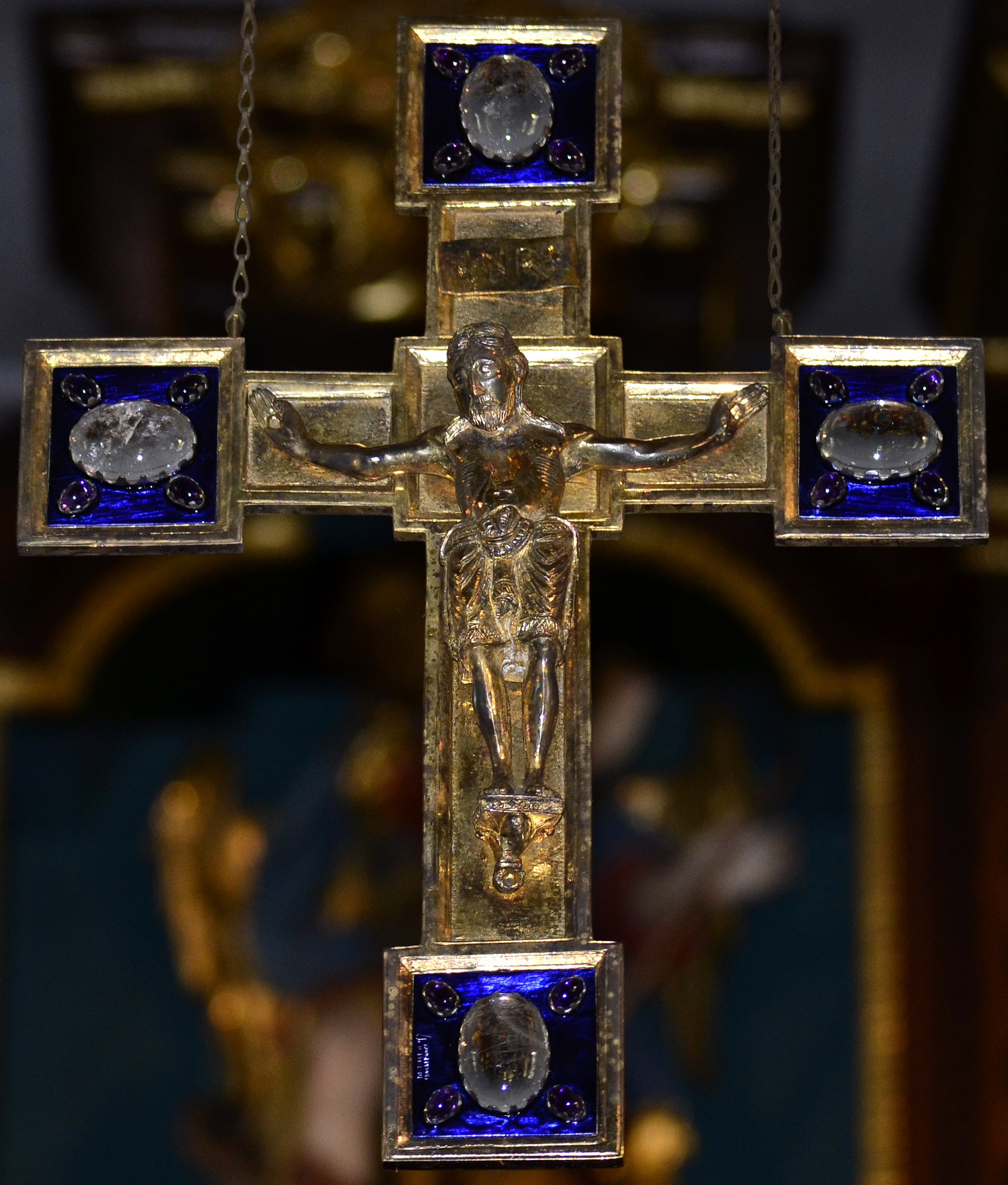 Kopie des "Hesselbacher Kreuzes" aus dem 12. Jahrhundert in der Kirche St. Luzia Und St. Odilia zu Hesselbach; Original im Landesmuseum Darmstadt